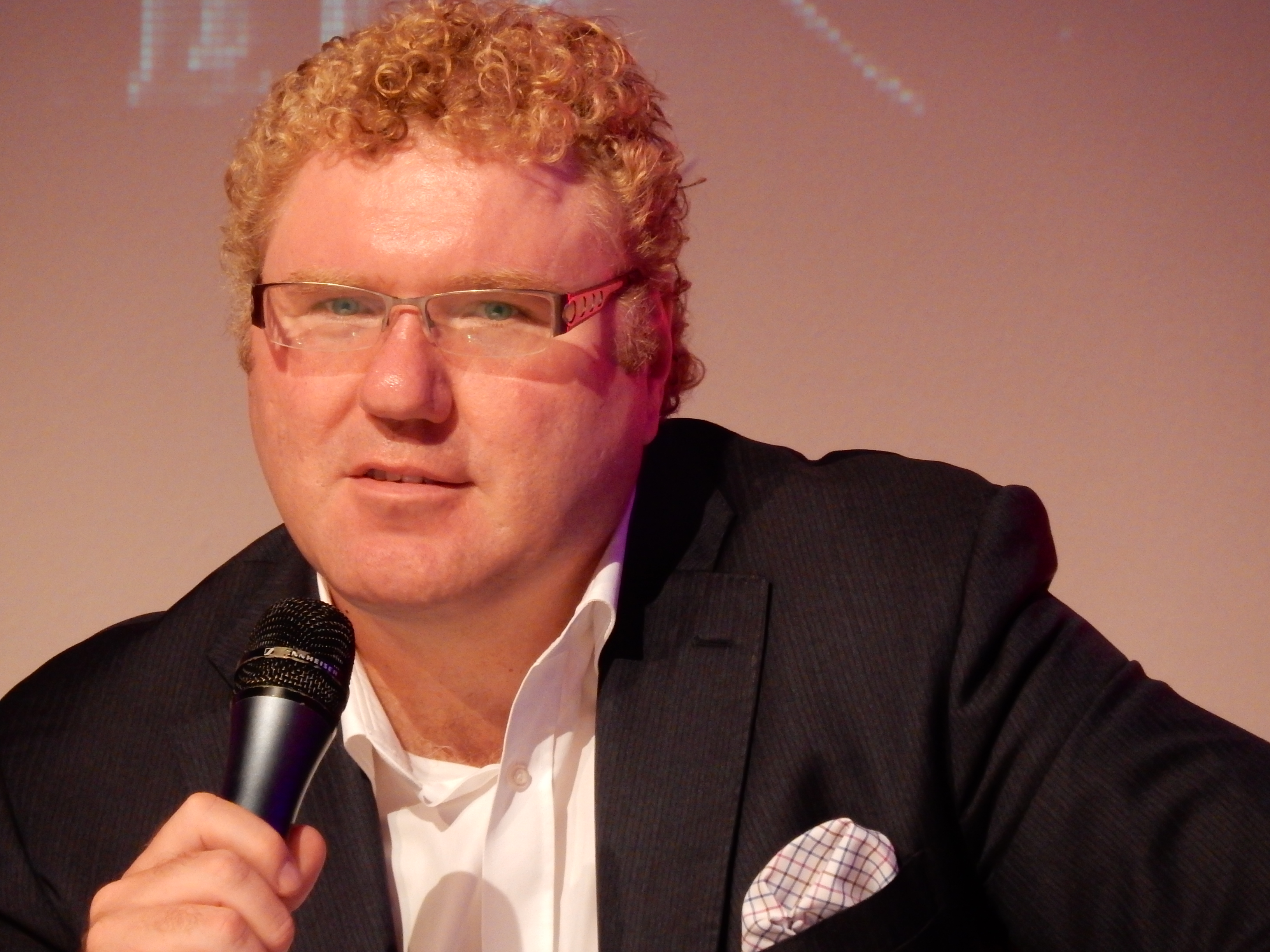 Fotky z novinářské konference 2.8.2016. Autor: Blanka Borová (Karolína Černá) pro Kritiky.cz